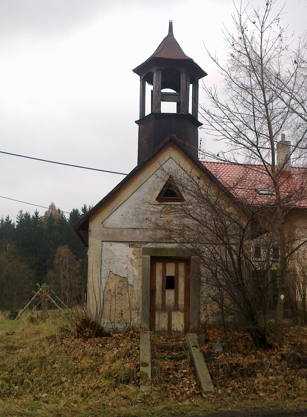 Výšinka - kaple